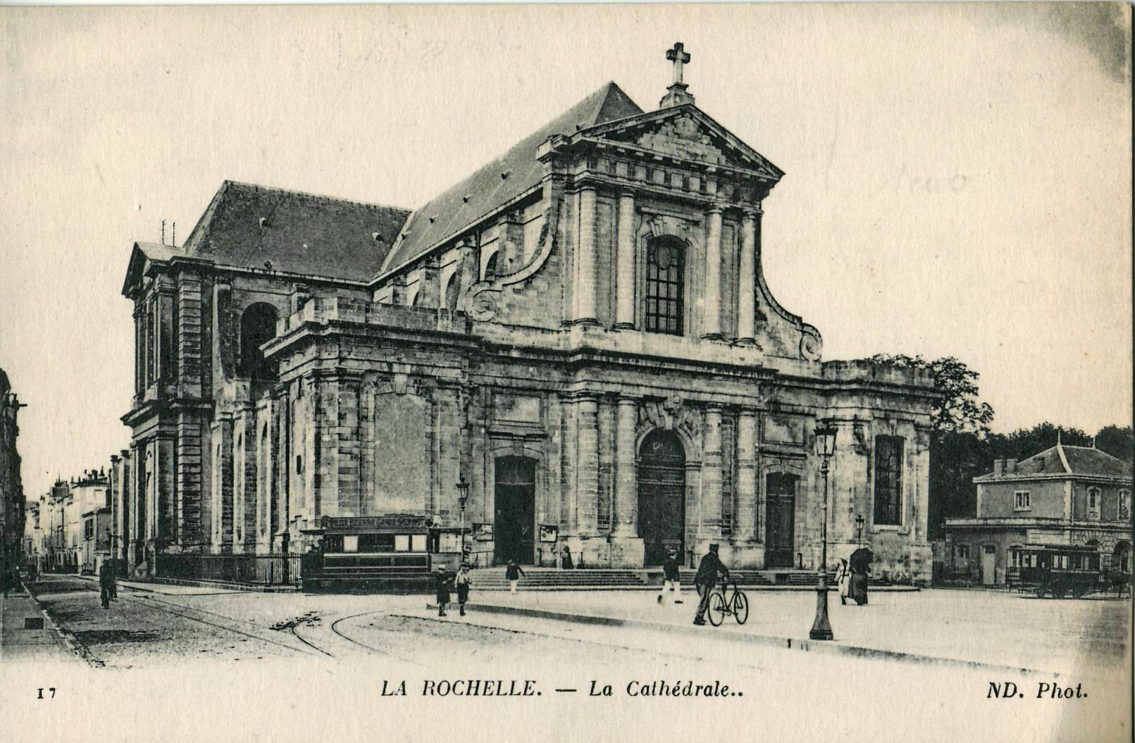 Carte postale ancienne éditée par ND, n°17 : LA ROCHELLE - La Cathédrale